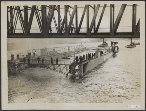 Droogdok voor Soerabaja. Het grote 3000 tons dok, bestemd voor de Marine te Soerabaja [Surabaya] van Burgerhout's Machinefabriek en Scheepswerf (waar het werd gebouwd) naar de Waalhaven gesleept, om voor de reis naar Nederlands-Indië te worden klaargemaakt